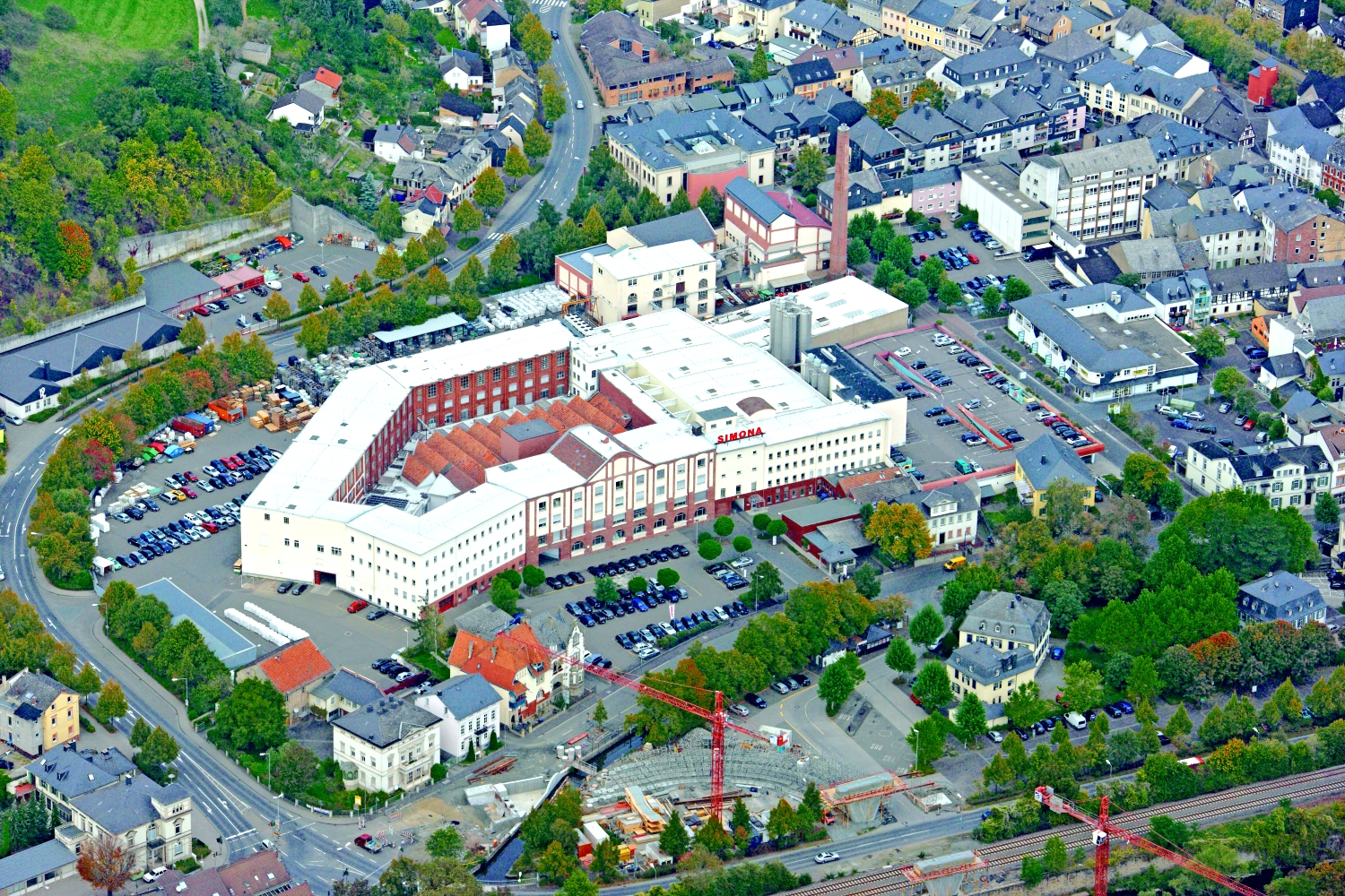 SIMONA Verwaltung und Werk 1 in Deutschland, 55606 Kirn. Luftaufnahme 2010